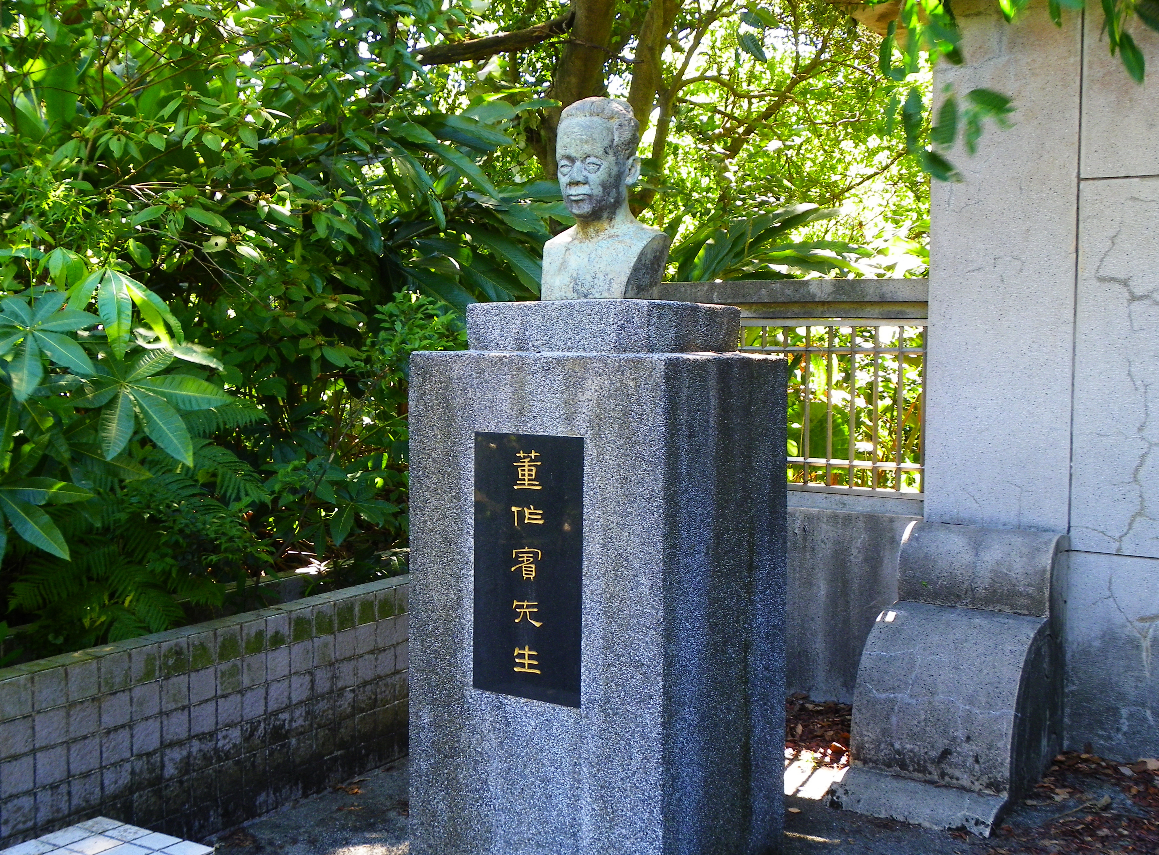 中文（台灣）: 董作賓先生墓的胸像。